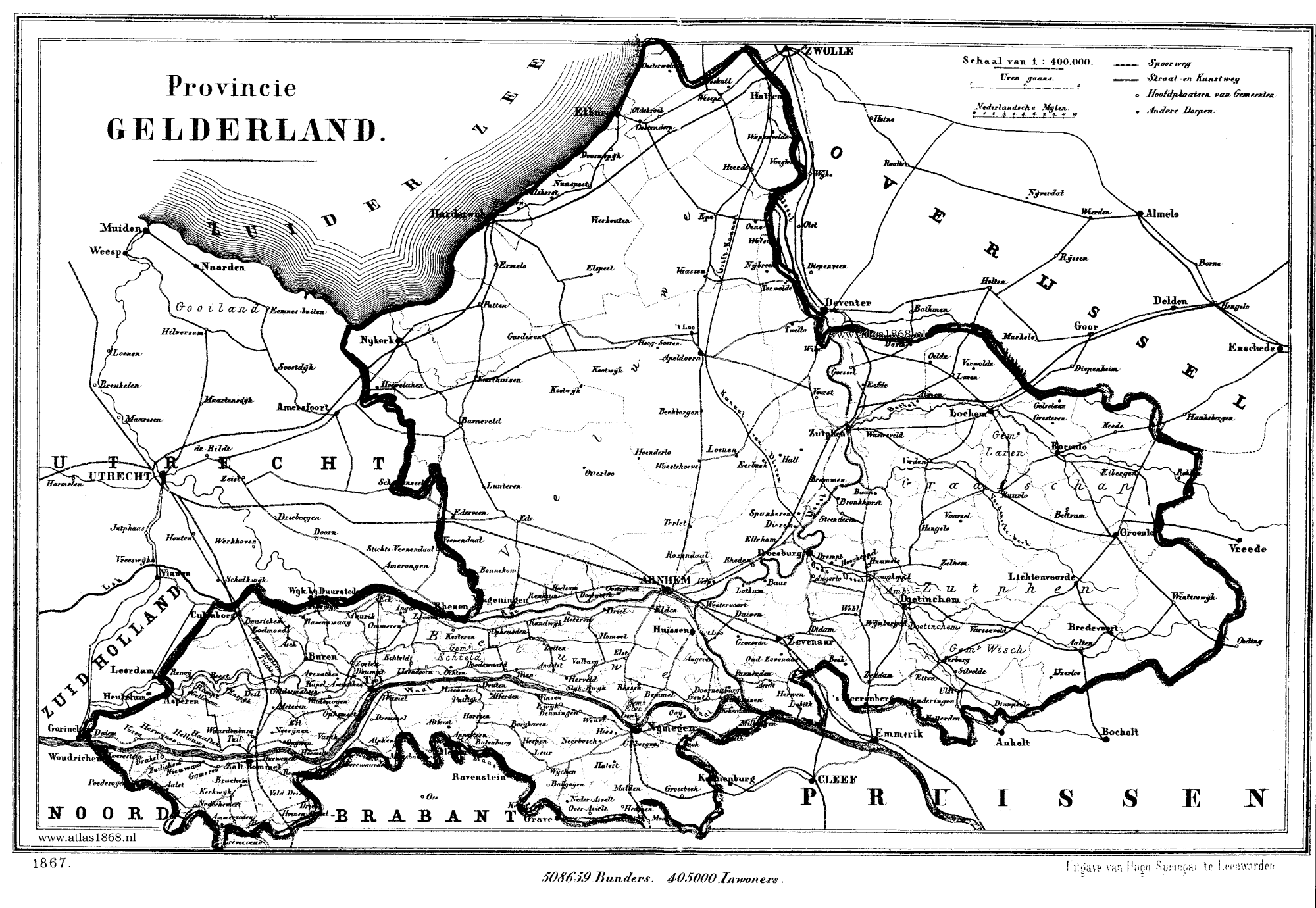 Provincie Gelderland. Kaart uit Gemeente-atlas van Nederland, getekend door Jacob Kuyper Deze afbeelding kan alleen worden gebruikt op Wikipedia. De naam van de website waar het vandaan kwam moet worden vermeld. De afbeelding komt van Het is de kaart van de provincie Gelderland.